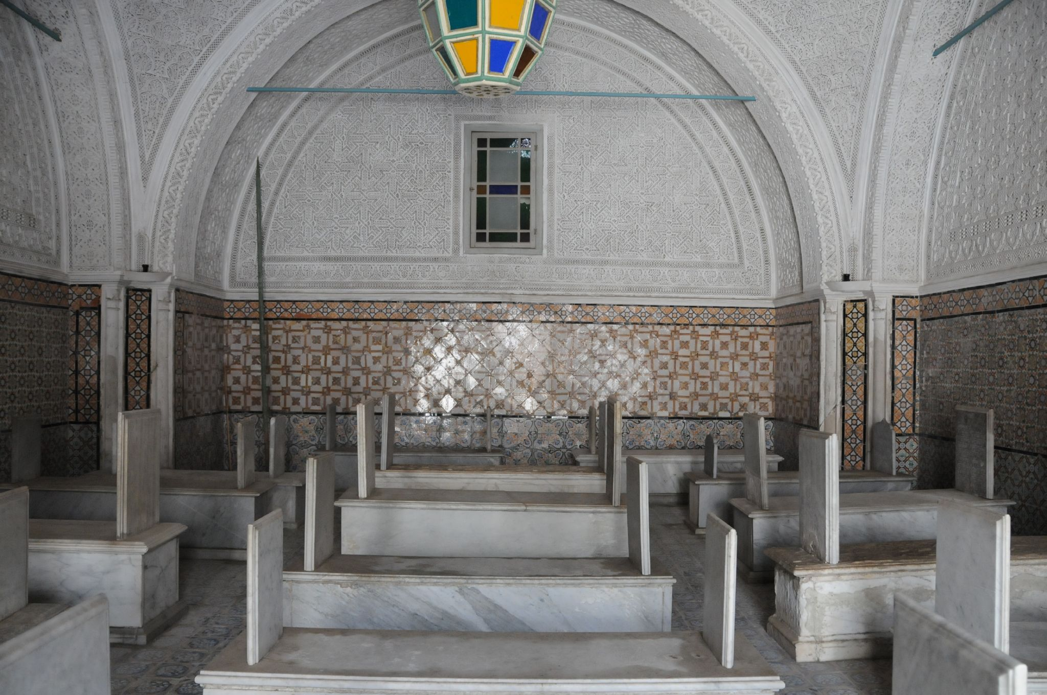 Tourbet El Bey dans la médina de Tunis, Tunis, Tunisie